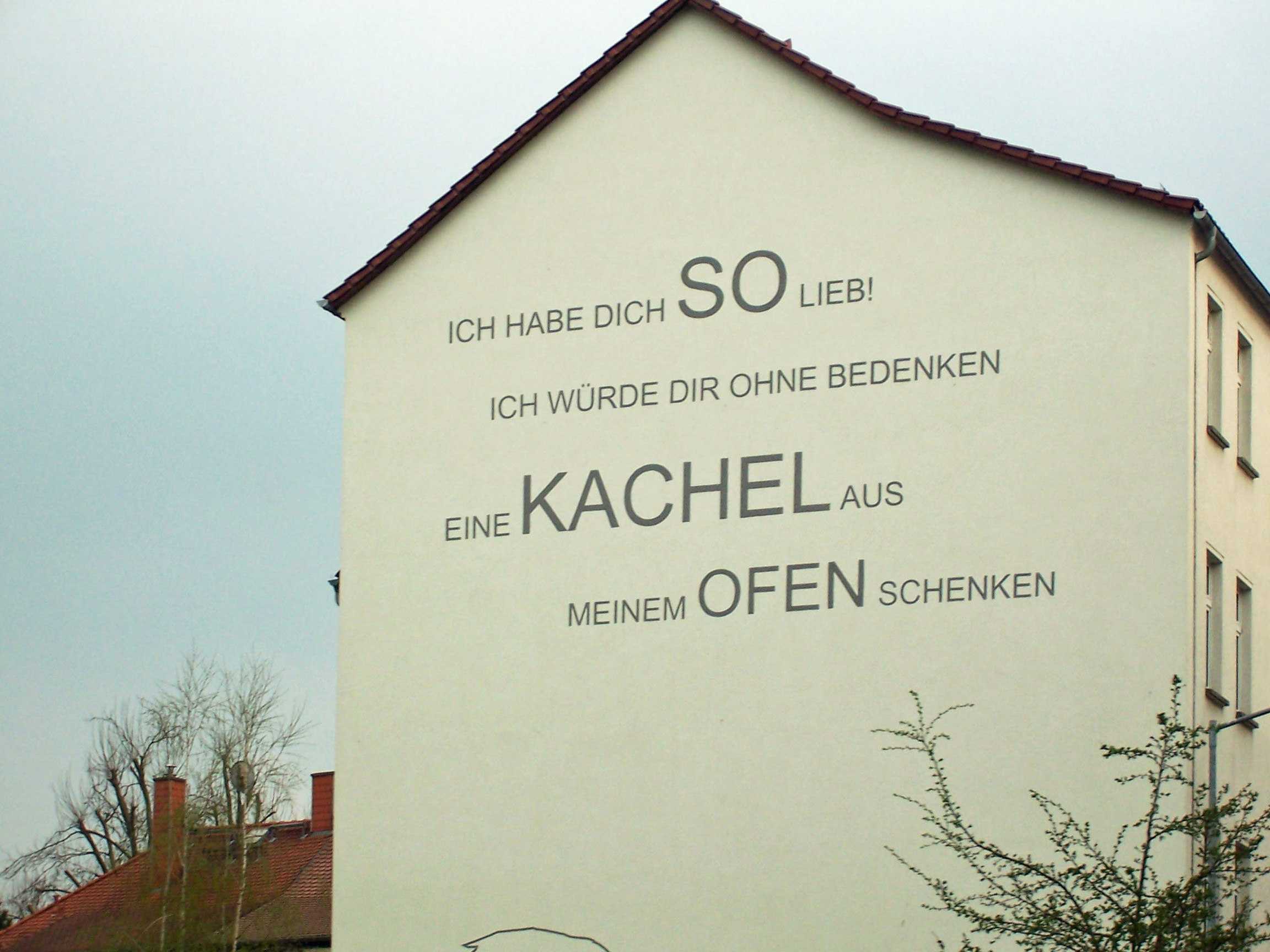 Hauswand in Wurzen mit einem Zitat von Joachim Ringelnatz